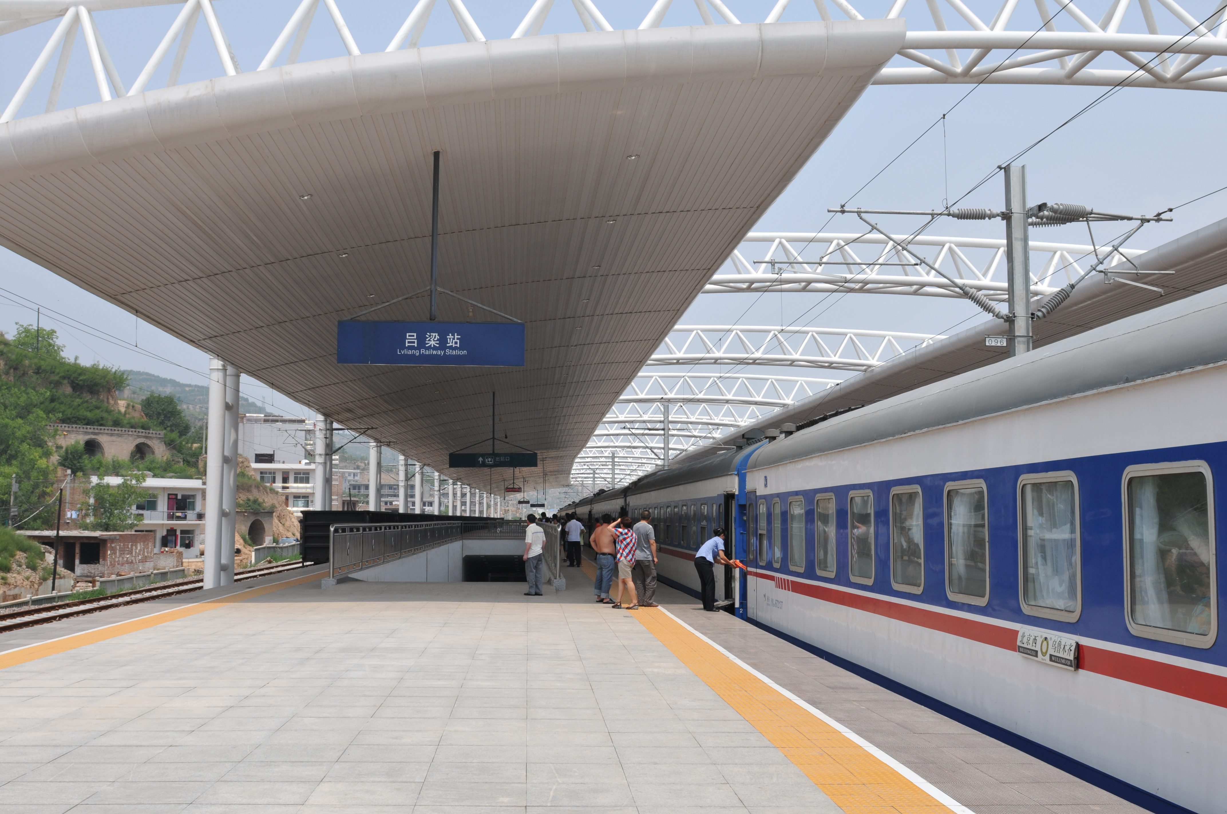 中国山西省吕梁市火车站，China Shanxi,Lvliang Train station China Xinjiang Urumqi Welcome you to tour the, Китай Синьцзяна Урумчи приветствовать Вас на экскурсию, الصين ترحب زيارتك لاورومتشى فى شينجيانغ, 中国新疆のウルムチへの訪問を歓迎する, 中国新疆乌鲁木齐欢迎您来观光旅游